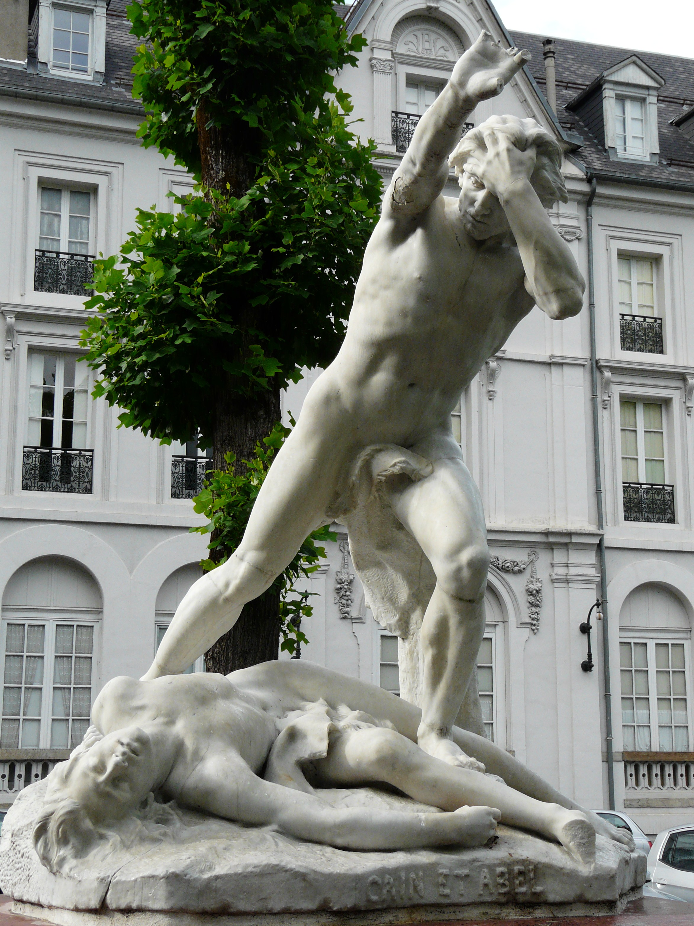 Caïn et Abel, statue réalisée par Jean-Marie-Mengue, Bagnères-de-Luchon, Haute-Garonne, France.